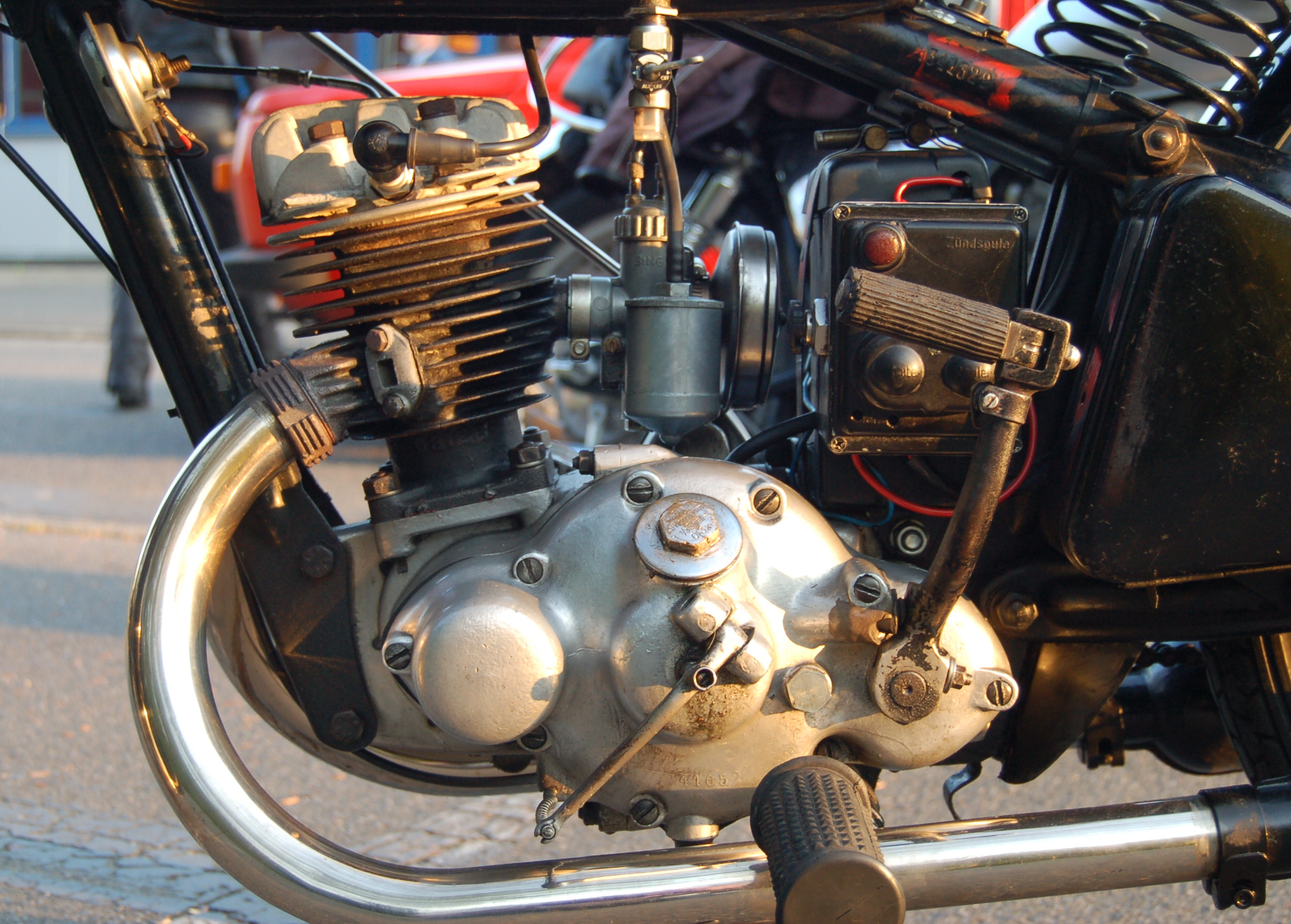 Motor einer DKW SB 200 Baujahr 1938. fotografiert beim Oldtimerteffen in Uetersen.